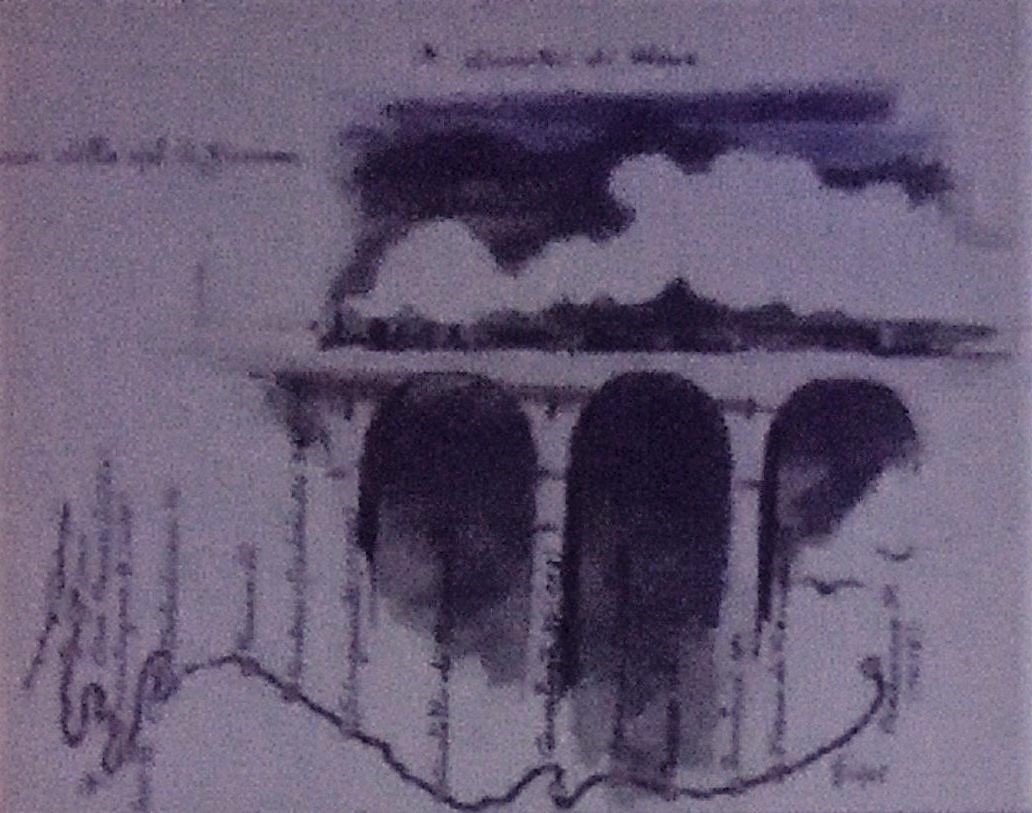 Ferrovia Val di Fiemme - Il viadotto di Glen in un disegno del 1982